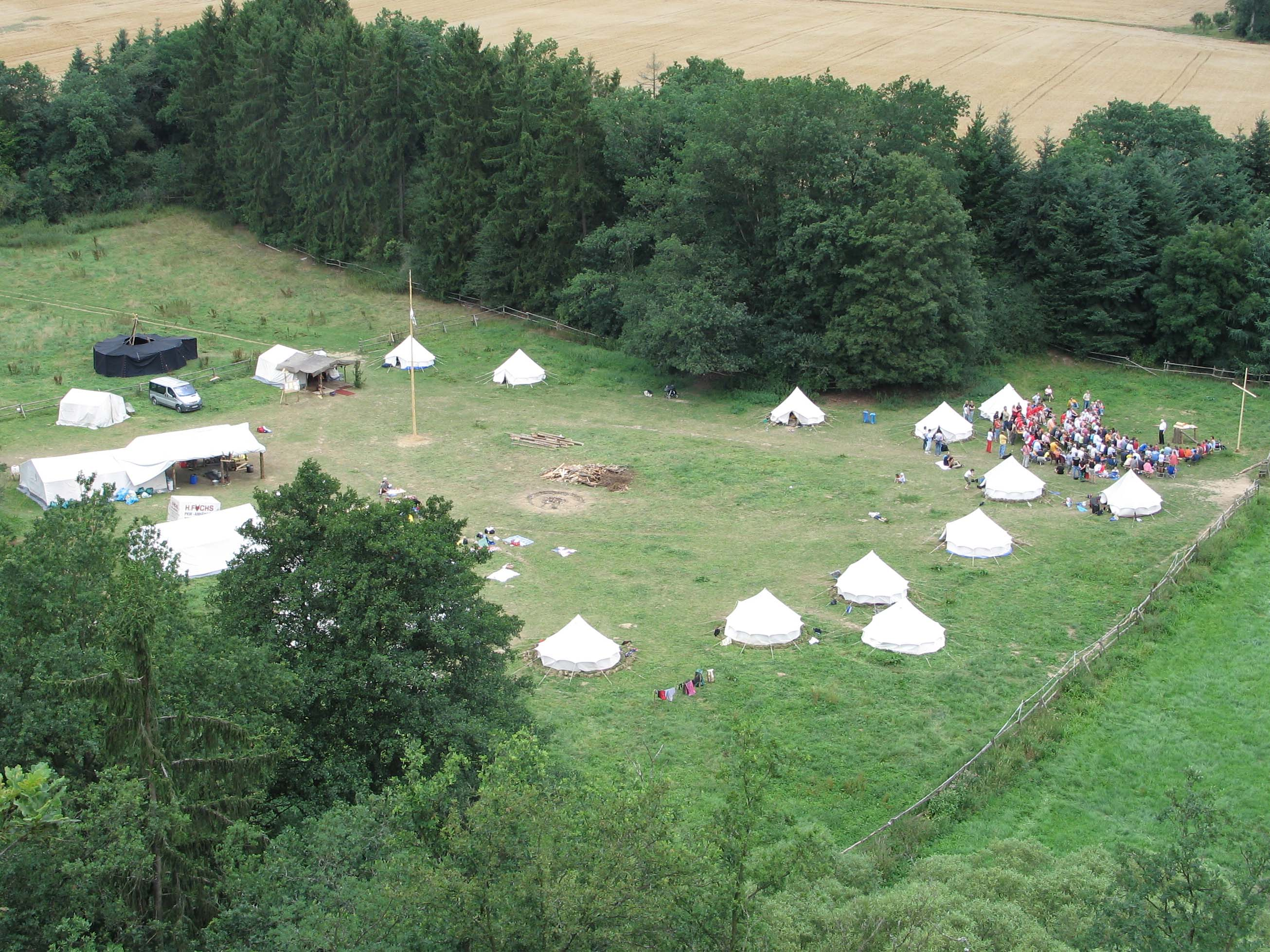 Gottesdienst am Besochersonntag im Zeltlager St.Georg Rüsselsheim